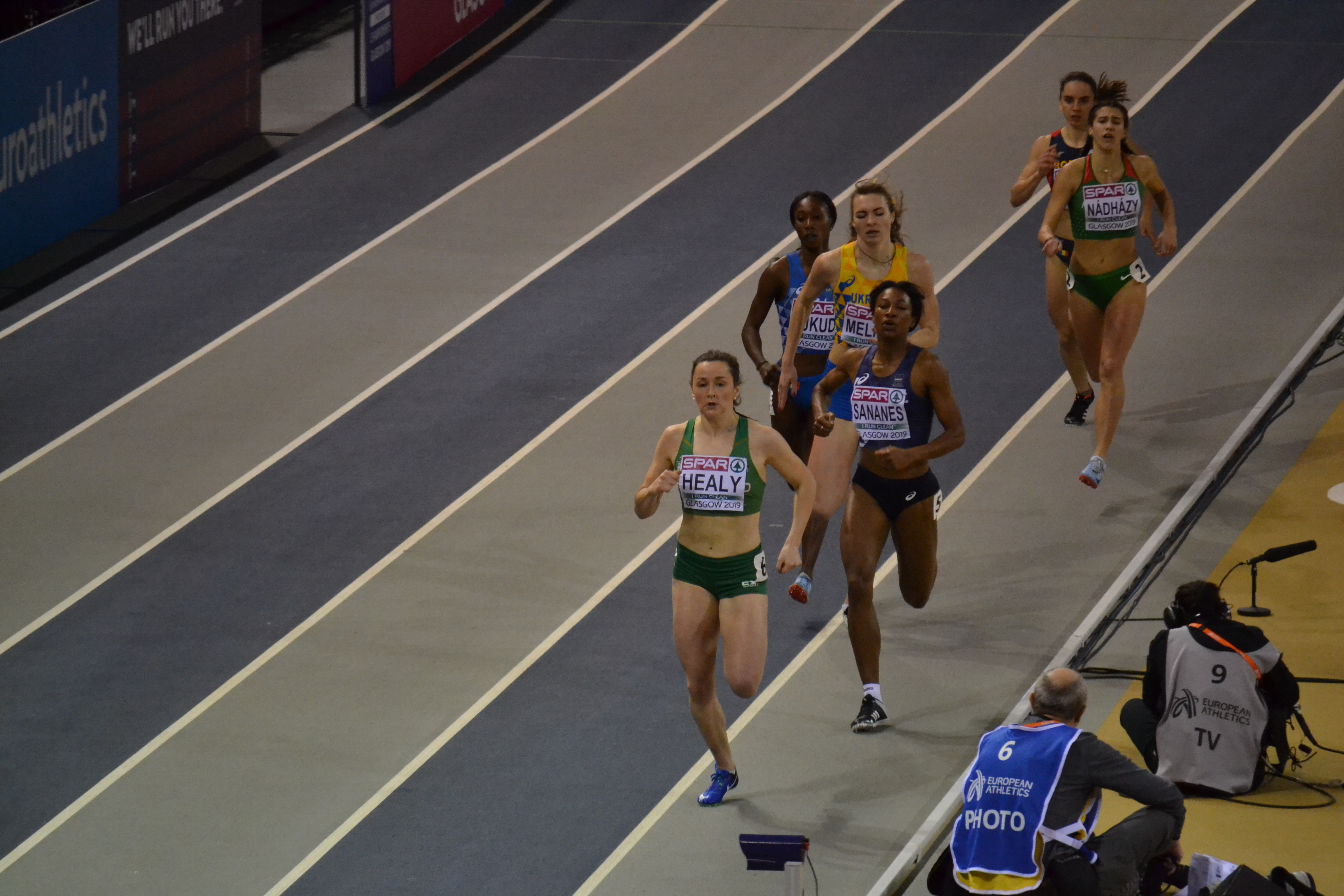 Womens 400m